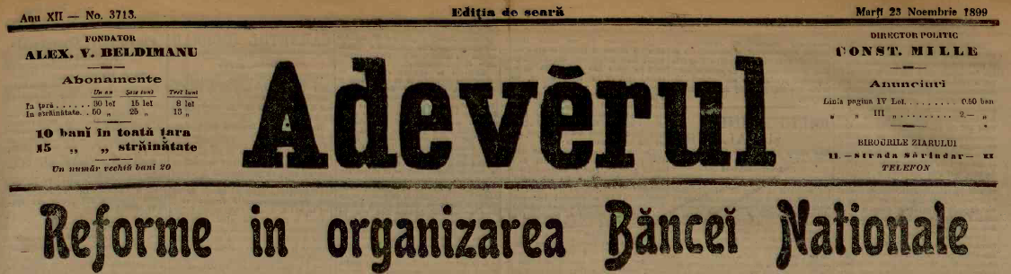 Extras din prima pagină a ziarului Adevărul, 1 12, nr. 3713, 23 noiembrie 1899 prezentând măsurile de reformă a statutului Băncii Naţionale a României